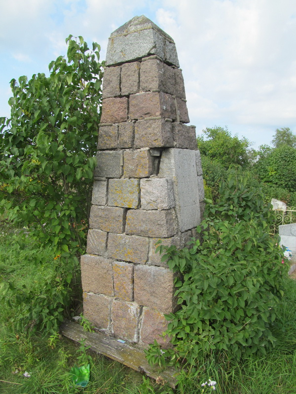 Гірэйшы. Помнік часоў Першай сусветнай вайны